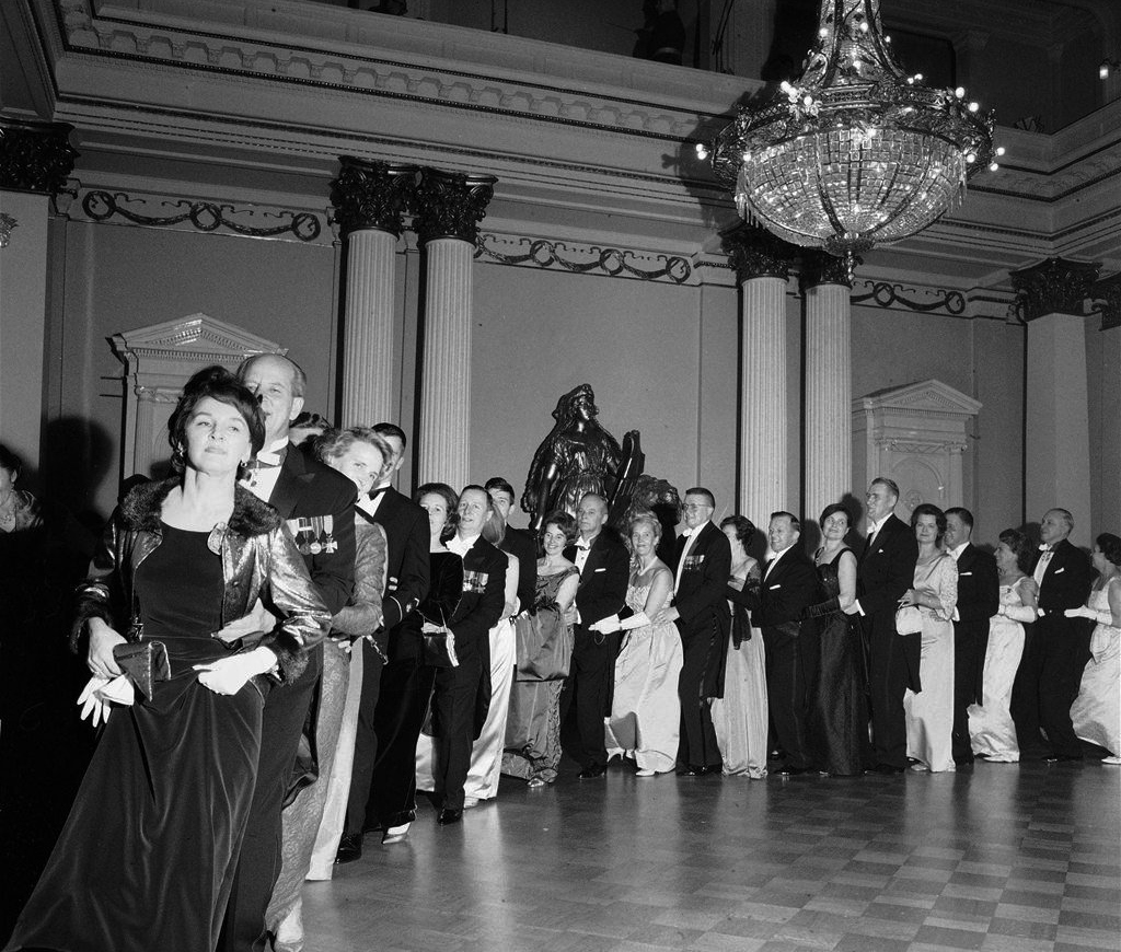 Letkajenkkaa tanssitaan itsenäisyyspäivän vastaanotolla.